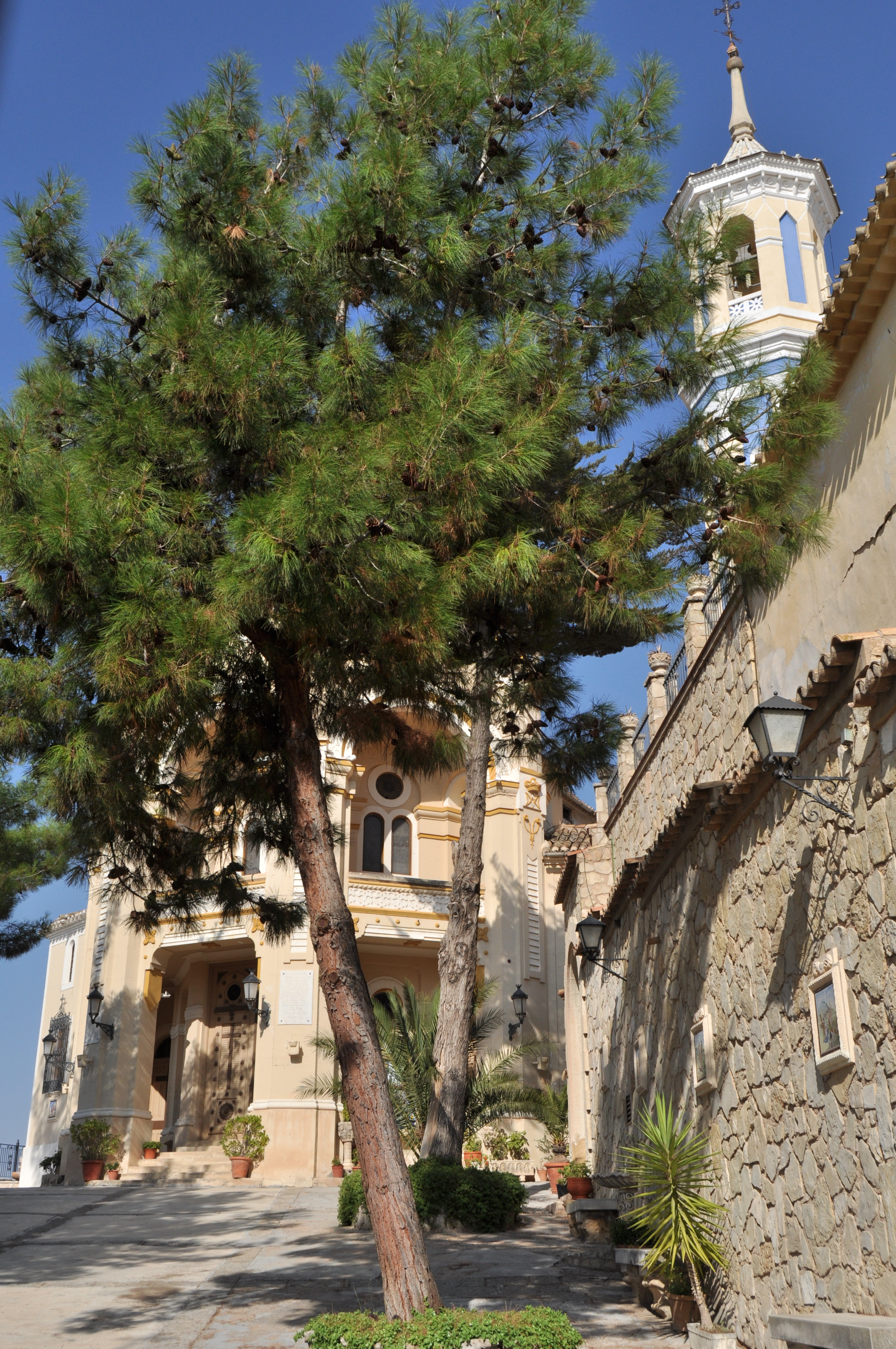 Hellin - 014